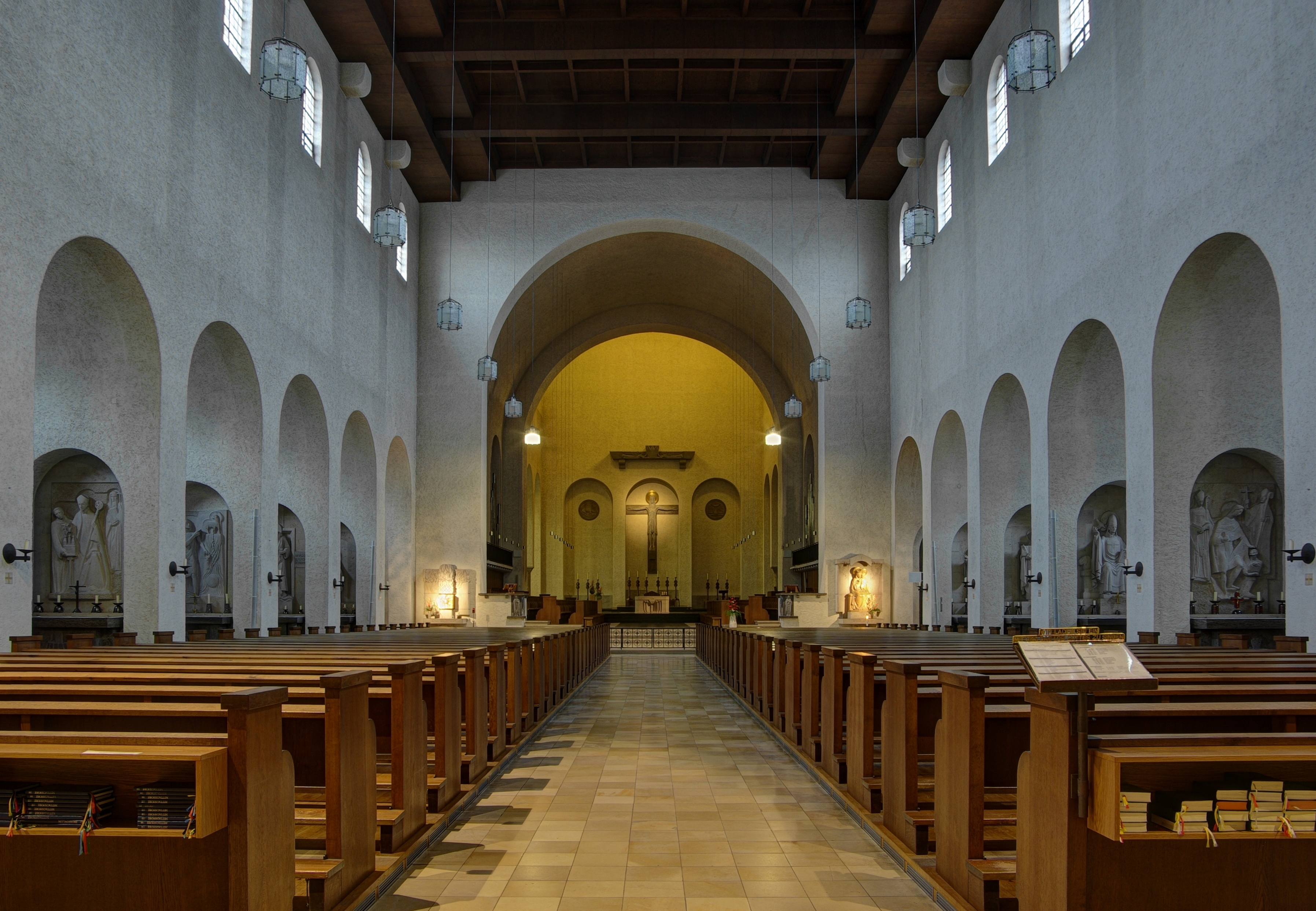 Abtei Münsterschwarzach, Innenraum